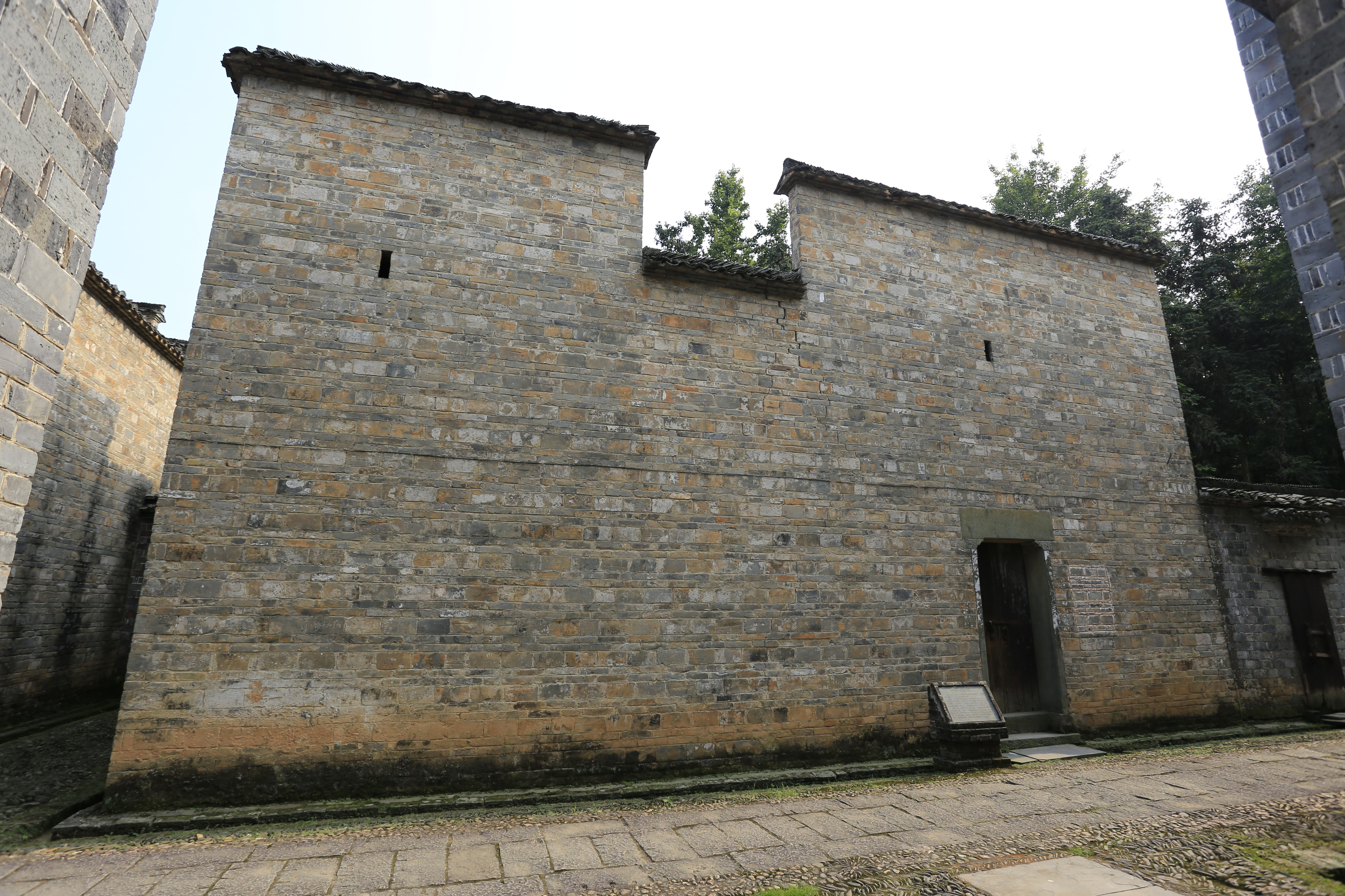 景德镇古窑民俗博览区——明园—— 金达故居，原位于浮梁县峙滩英溪乡